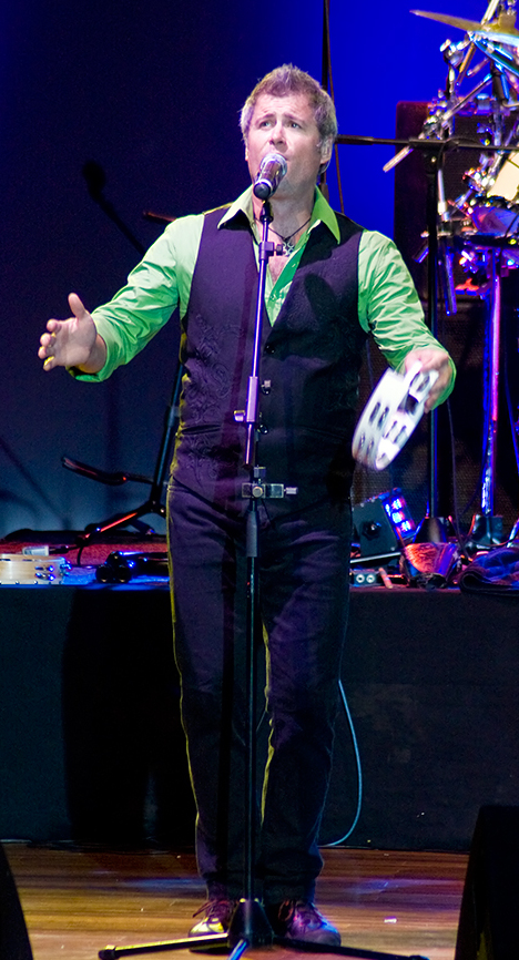 Yes concert at Gran Teatro del Banco Central del Paraguay, Asunción, Paraguay